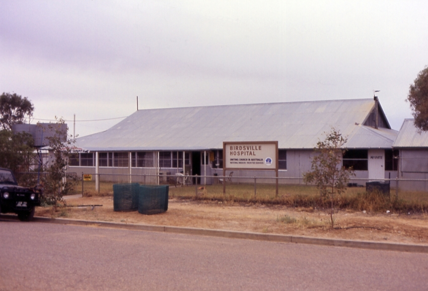 Birdsville hospital 110687